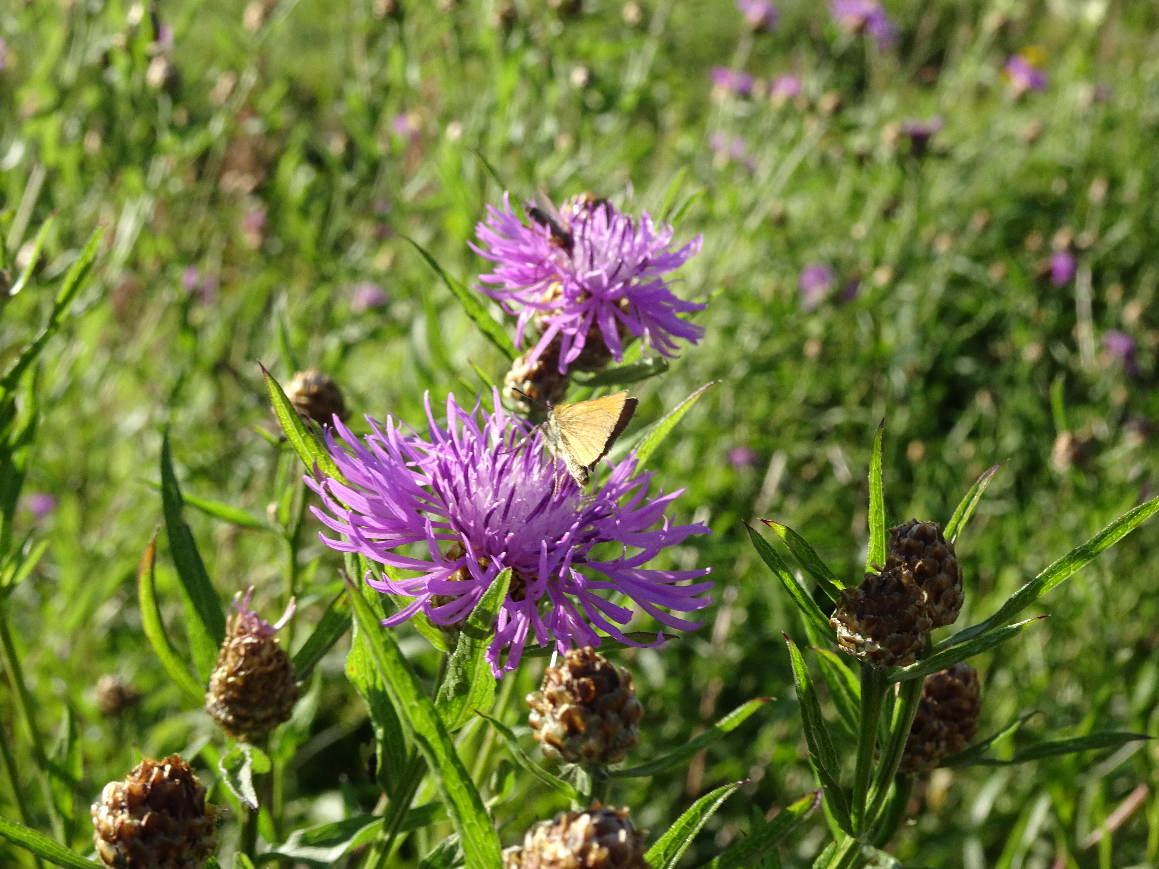 Arujumikas (Centaurea jacea), teeservas Mäksa vallas